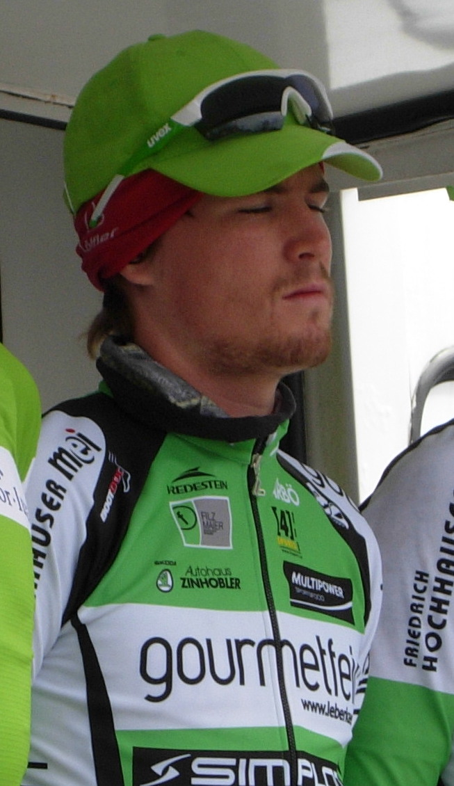 Tour de Bretagne 2013 - Présentation des équipes au départ de la deuxième étape à Ploemel - Équipe Gourmetfein Simplon Depicted person: Stephan Rabitsch